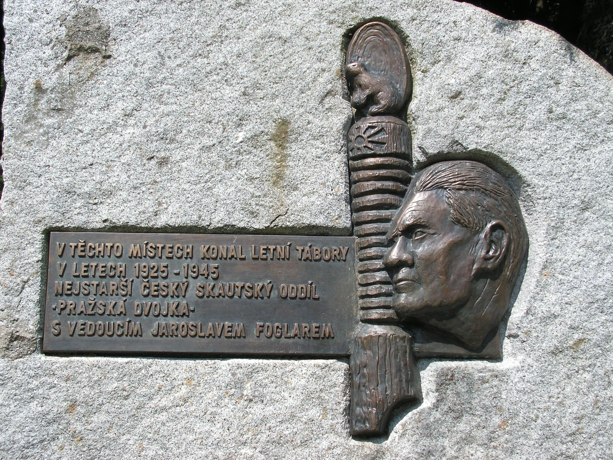 Památník Jaroslava Foglara ve Sluneční zátoce nedaleko Ledče nad Sázavou.